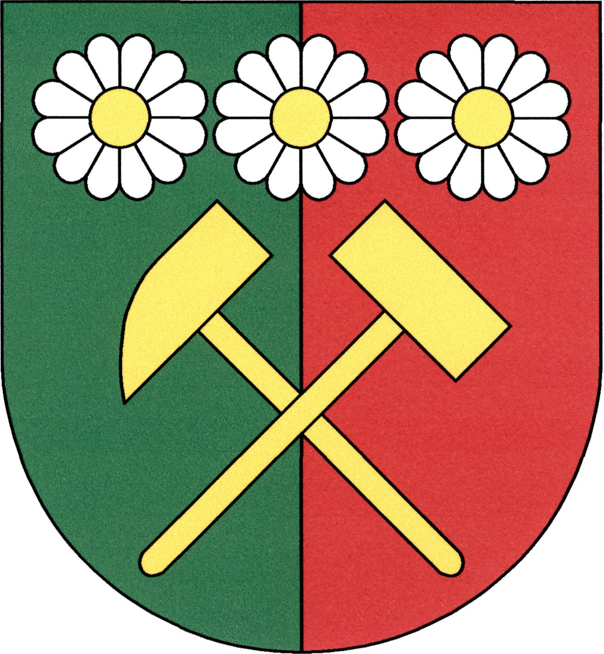 Znak obce Dolní Rychnov